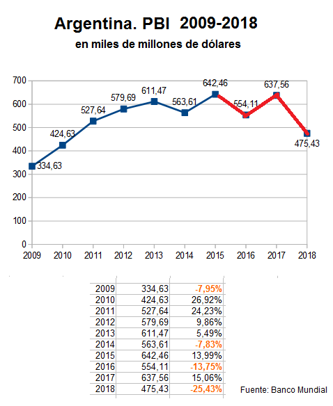 Argentina PBI USD 2009-2018 (Macri). Fuente Banco Mundial y Atlas Mundial de Datos de Knoema.